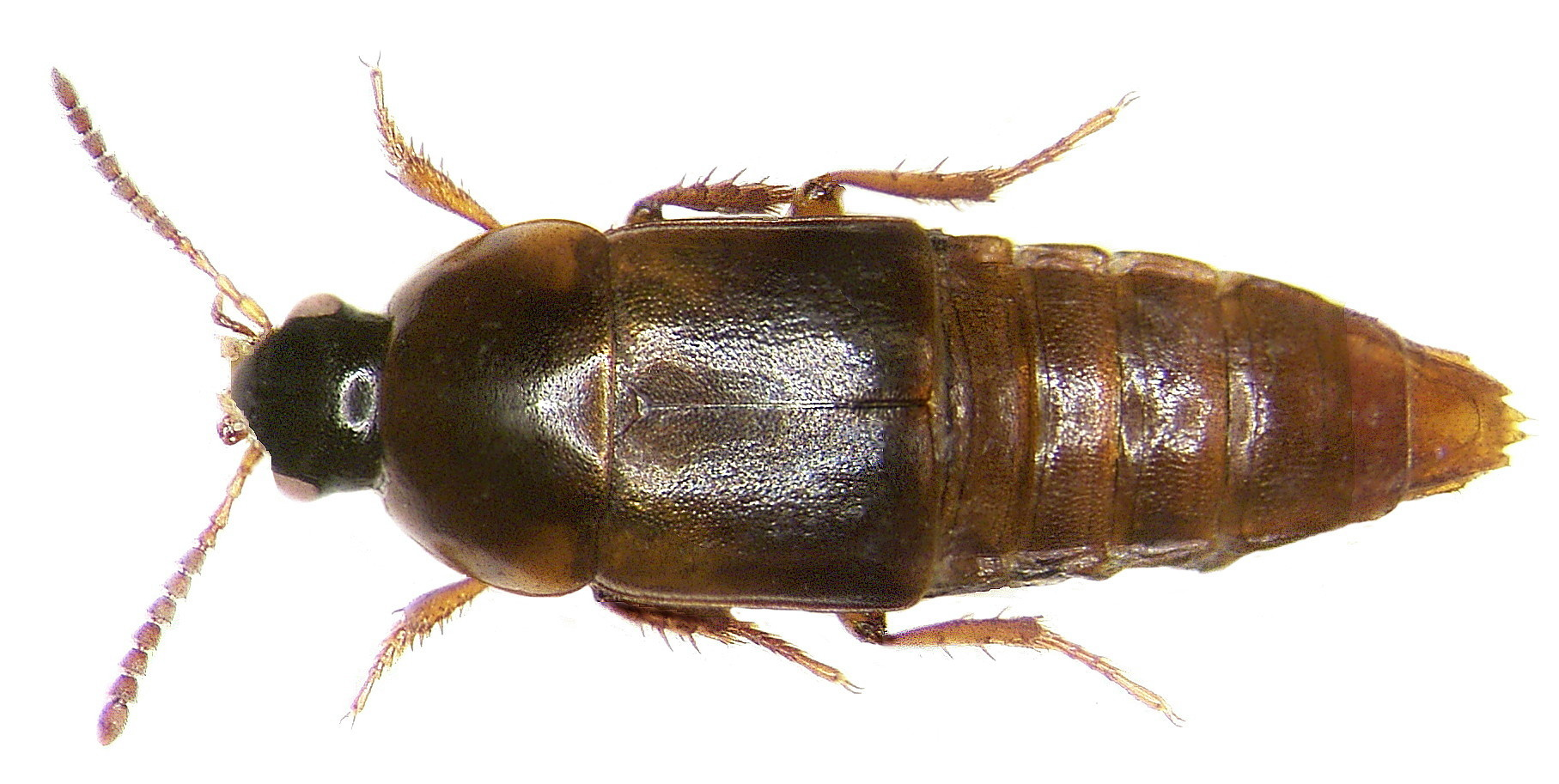 Familie: Staphylinidae Grösse: 5-6 mm Verbreitung: Europa Öklogie: vorzugsweise an saftenden Bäumen Fundort: Germania, Oberfranken, Oberkotzau leg. A.Skale, 2004; det. U.Schmidt, 2004 Foto: U.Schmidt, 2006